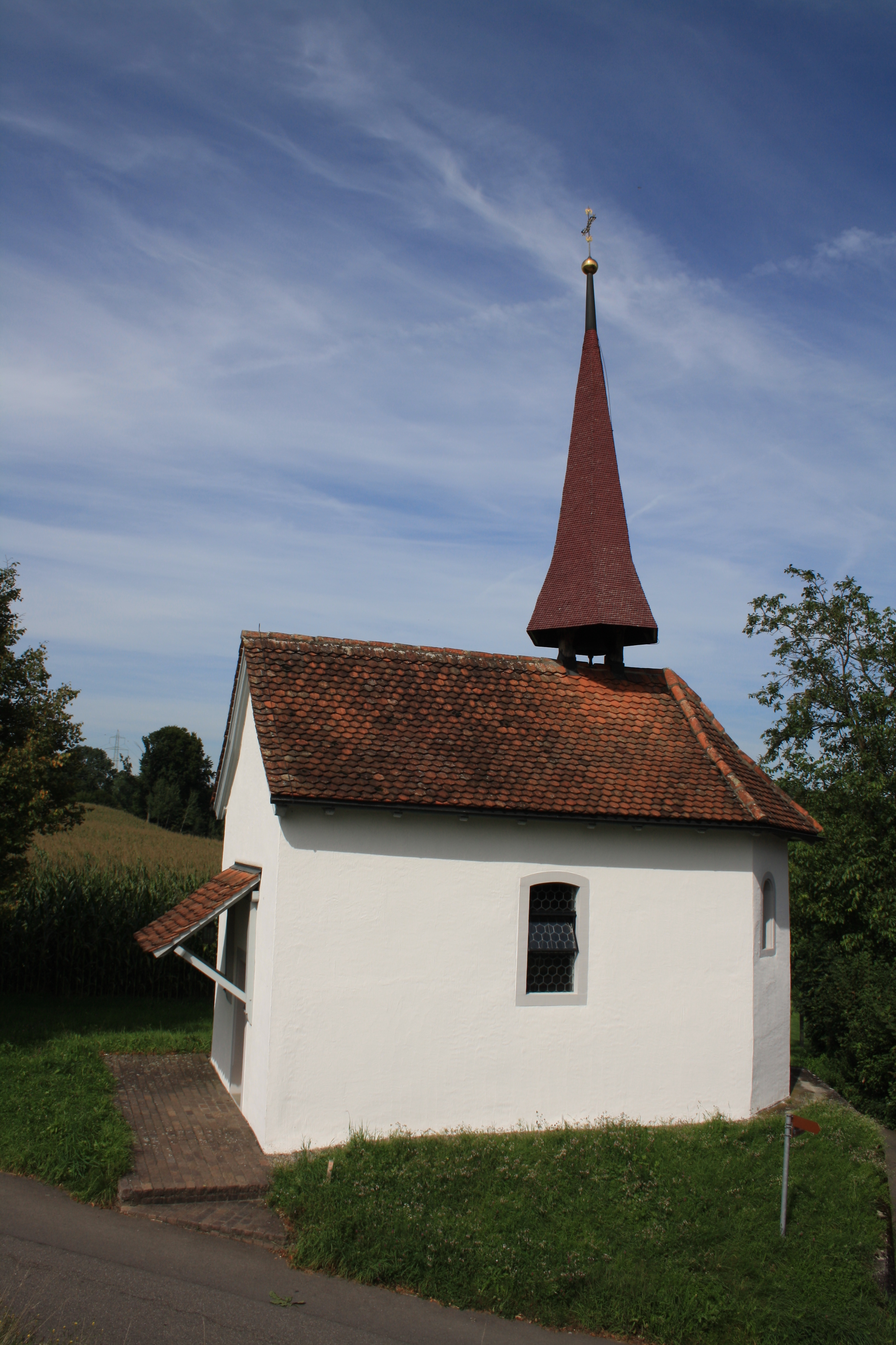 Kapelle von Meienberg, Sins, Aargau, Schweiz